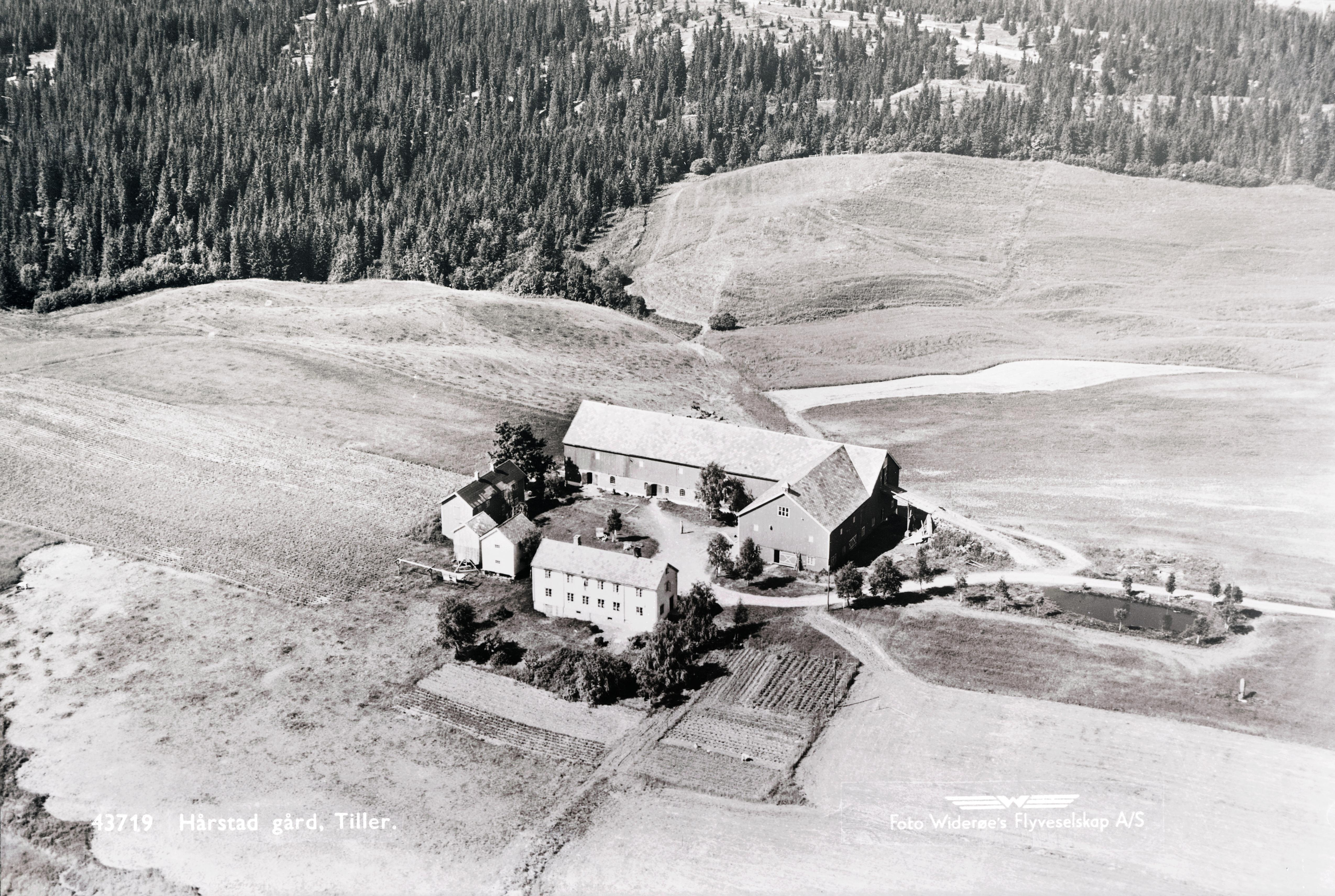 Hårstad, gårdsbruk på Tiller. Låve, fjøs, våningshus, jorder, vei, skog